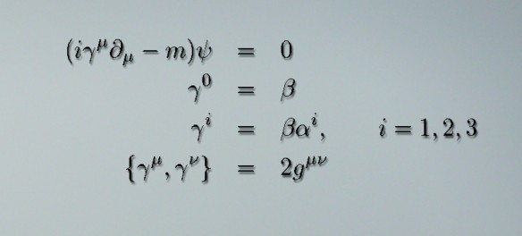 Ecuación de Dirac en su forma covariante. Forme covariante de l'équation de Dirac. Dirac equation, covariant form.